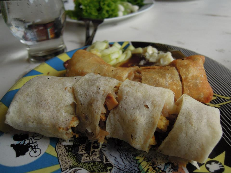 Lumpia (juga ditulis: Lunpia / Loenpia) Gang Lombok Semarang